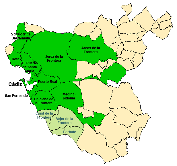 Municipios constituyentes del Consorcio de Transportes de la Bahía de Cádiz.